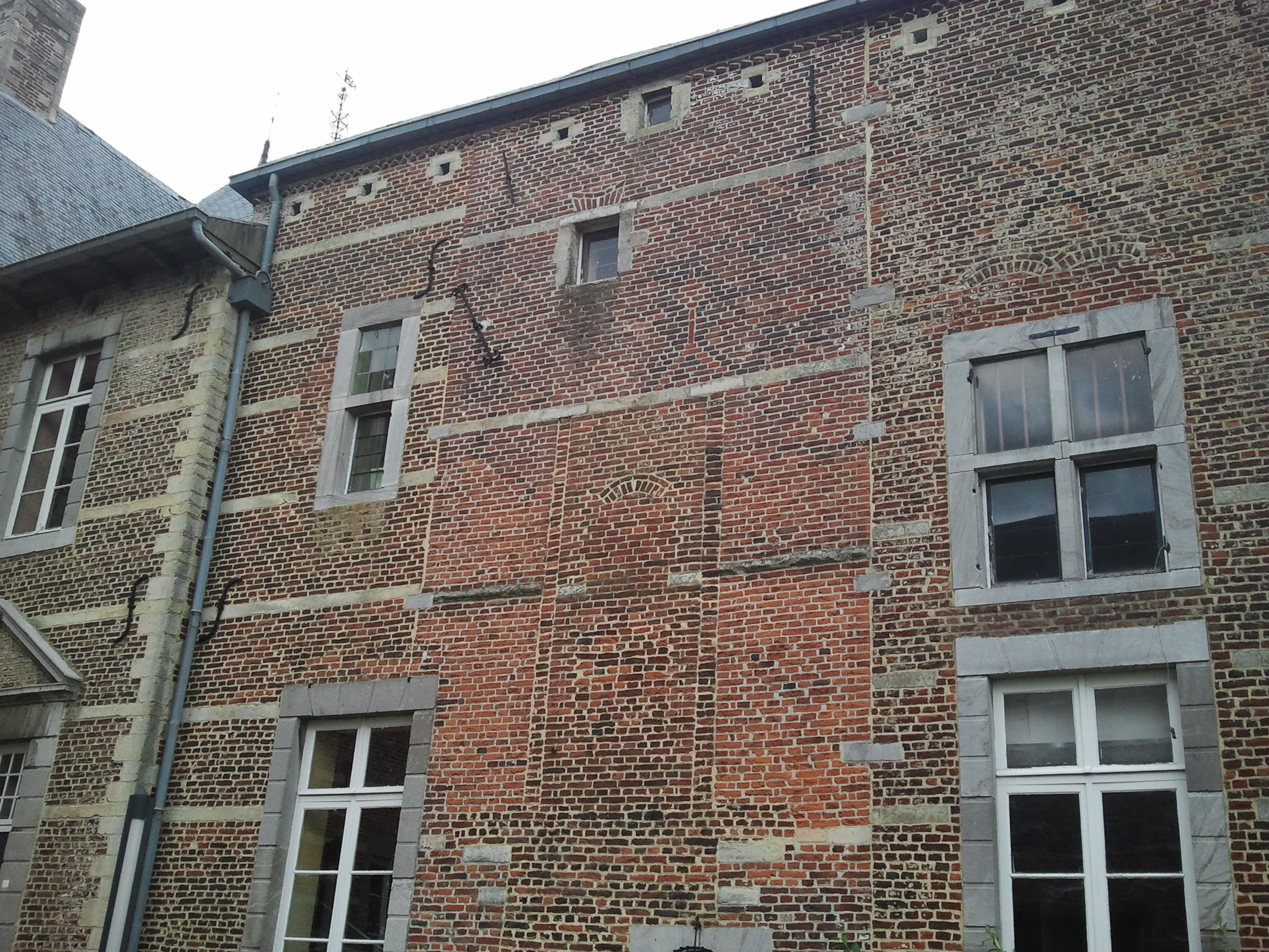 Metselaarstekens (maalkruis en negatief calvarie) op gevel kasteel van Rijkel